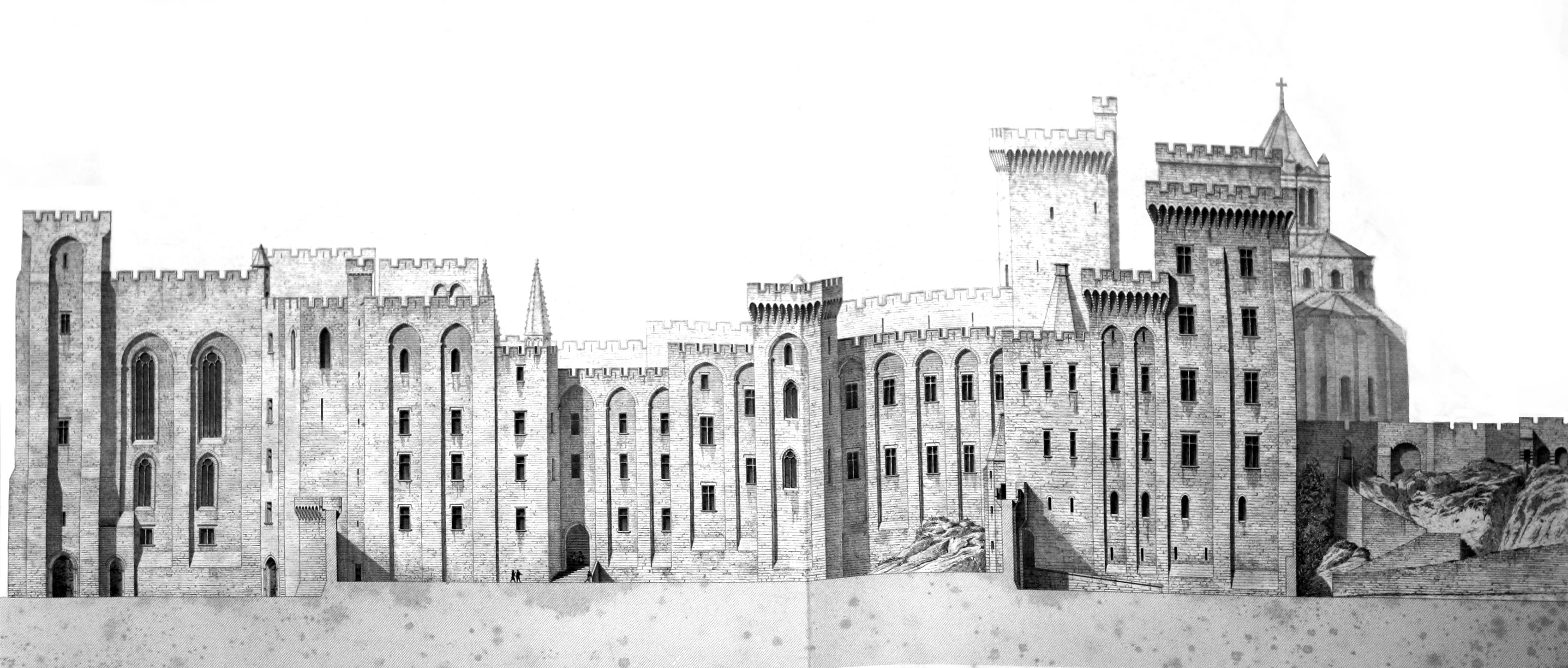 Palais des Papes, façade est - Avignon, Vaucluse, France